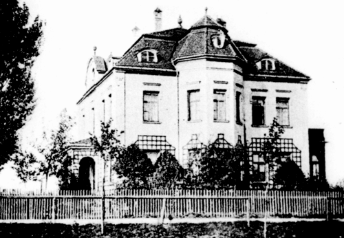 Lorenz Hartl jun.s Villa in St. Emmeram, abgerissen in den 1960er Jahren